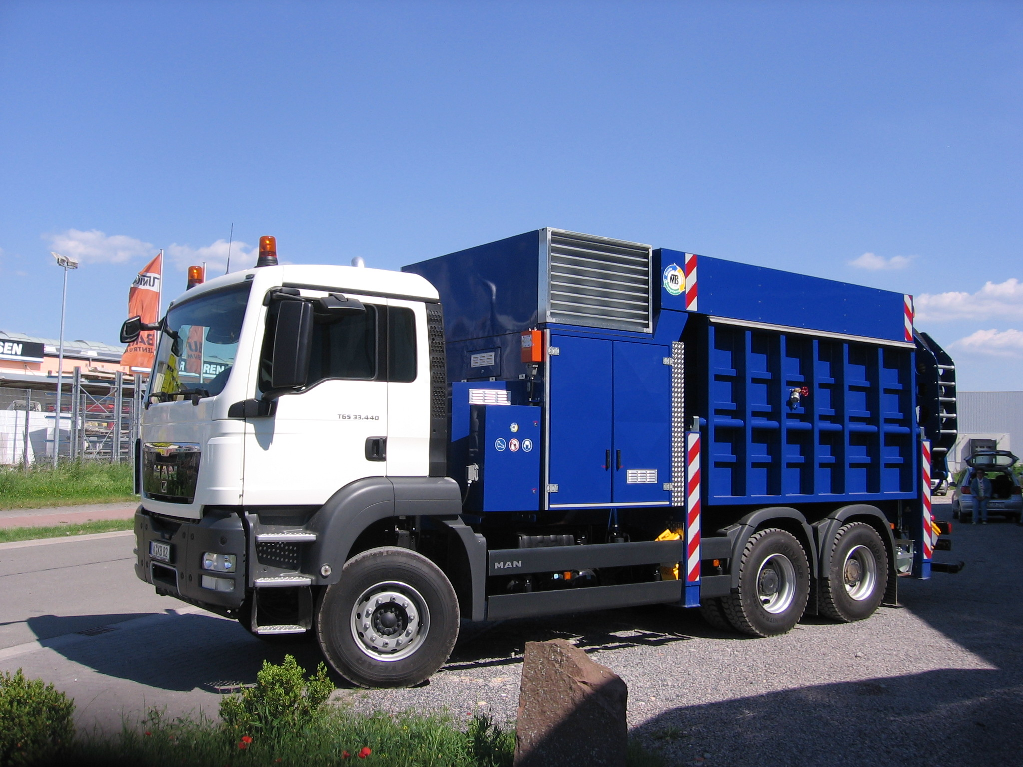 MTS Saugbagger